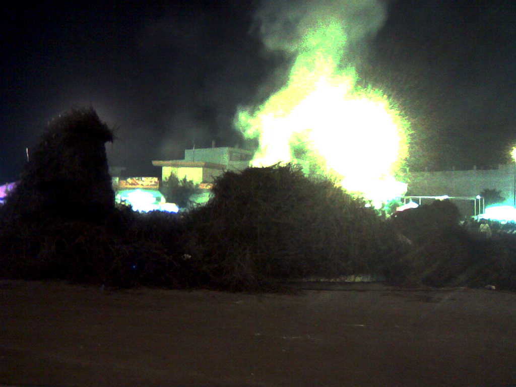 dopo 24 ore è diminuita parecho